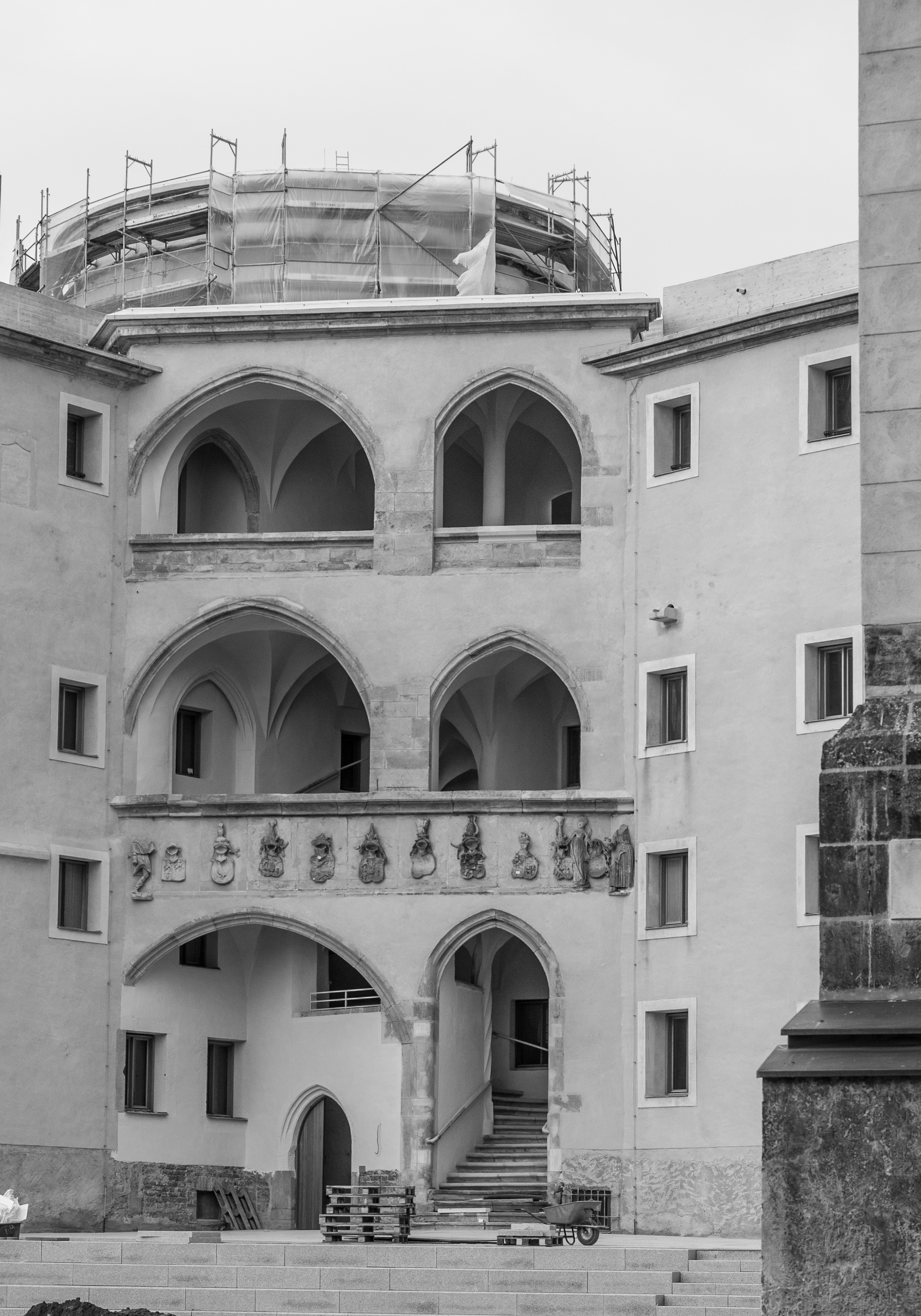 Südliches Treppenhaus. Das Schloss Wittenberg wurde ab 1489 unter Kurfürst Friedrich dem Weisen von Sachsen als Residenzschloss errichtet